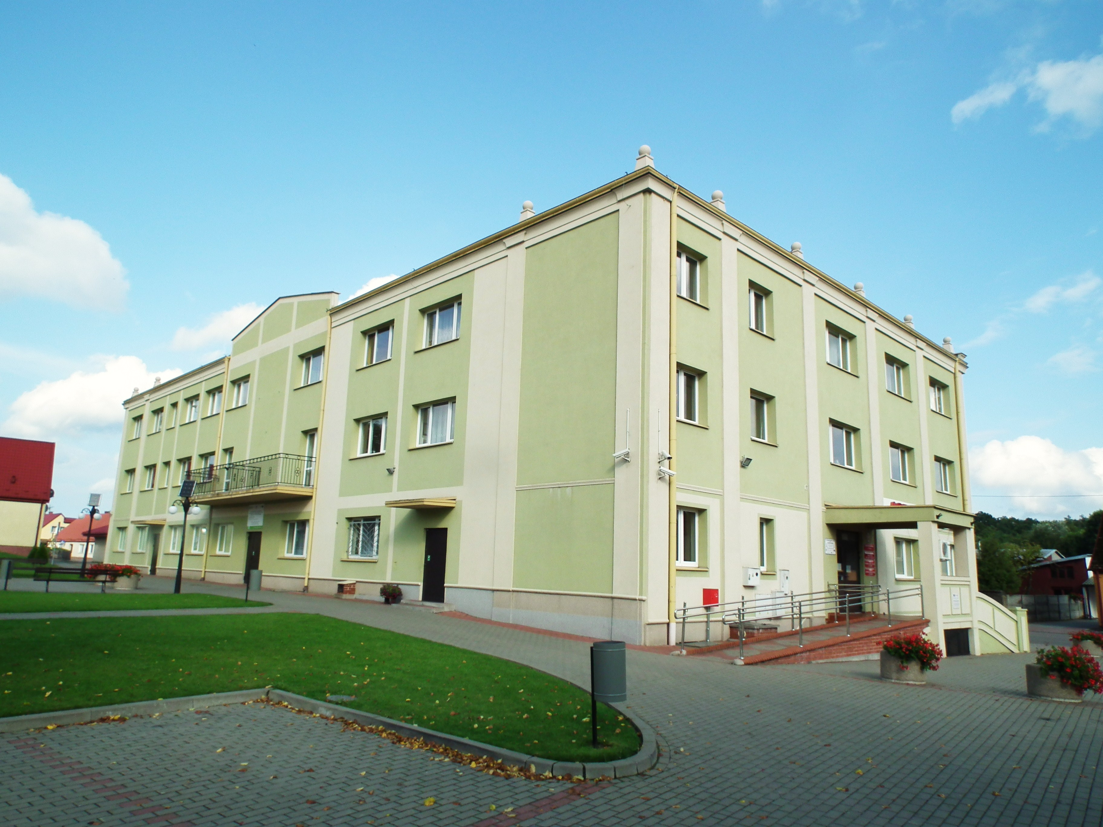 UMiG w Tychowie.